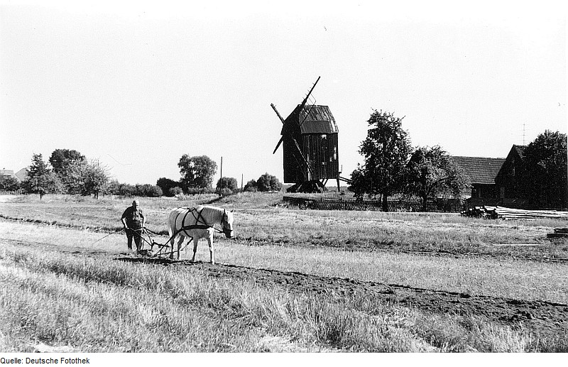 Original image description from the Deutsche Fotothek Genthin-Mützel. Kageler Mühle, Bockmühle, Baujahr 1815 (1815 umgesetzt von Scharteucke)